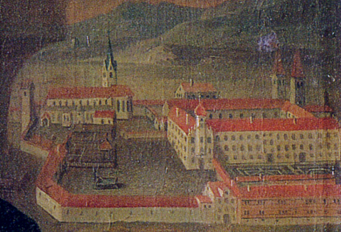 Kloster St. Georg Isny, Detail vom Porträt des Abts Wolfgang Schmid (Abtgalerie in der Marienkapelle der Klosterkirche Isny)